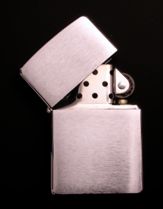 Zippo, Modell Nr.: 020200 - Regular Brushed Chrome Fotografiert am: 05.12.2003 Copyright Status: GNU Freie Dokumentationslizenz